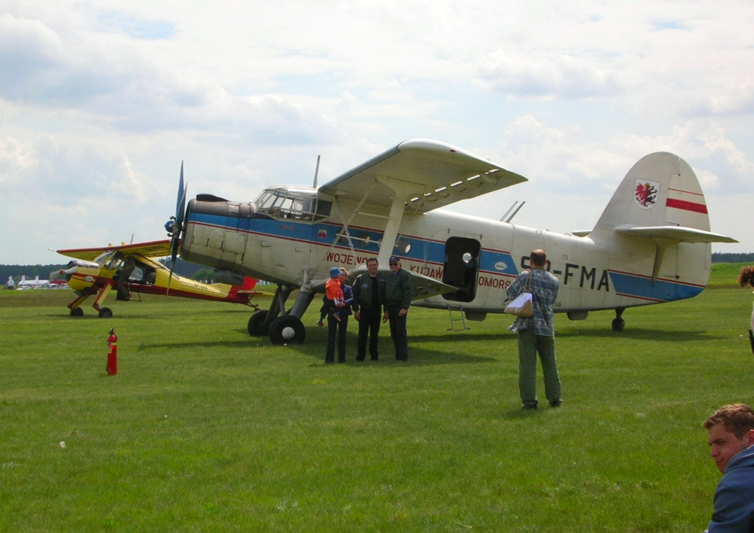 Lotnisko aeroklubu bydgoskiego podczas festynu lotniczego